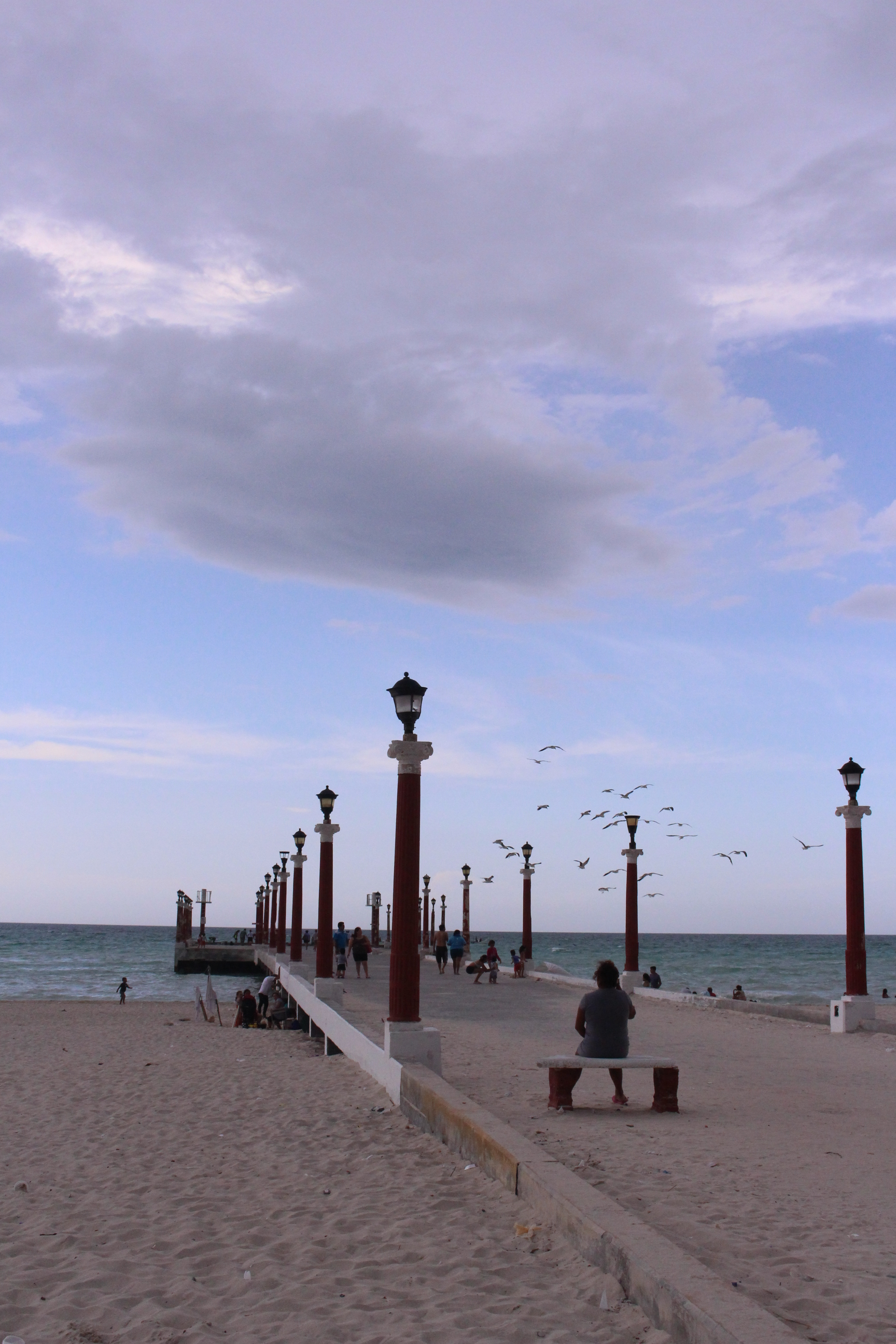 Sisaleko kaiaren irudia ezagunena da.